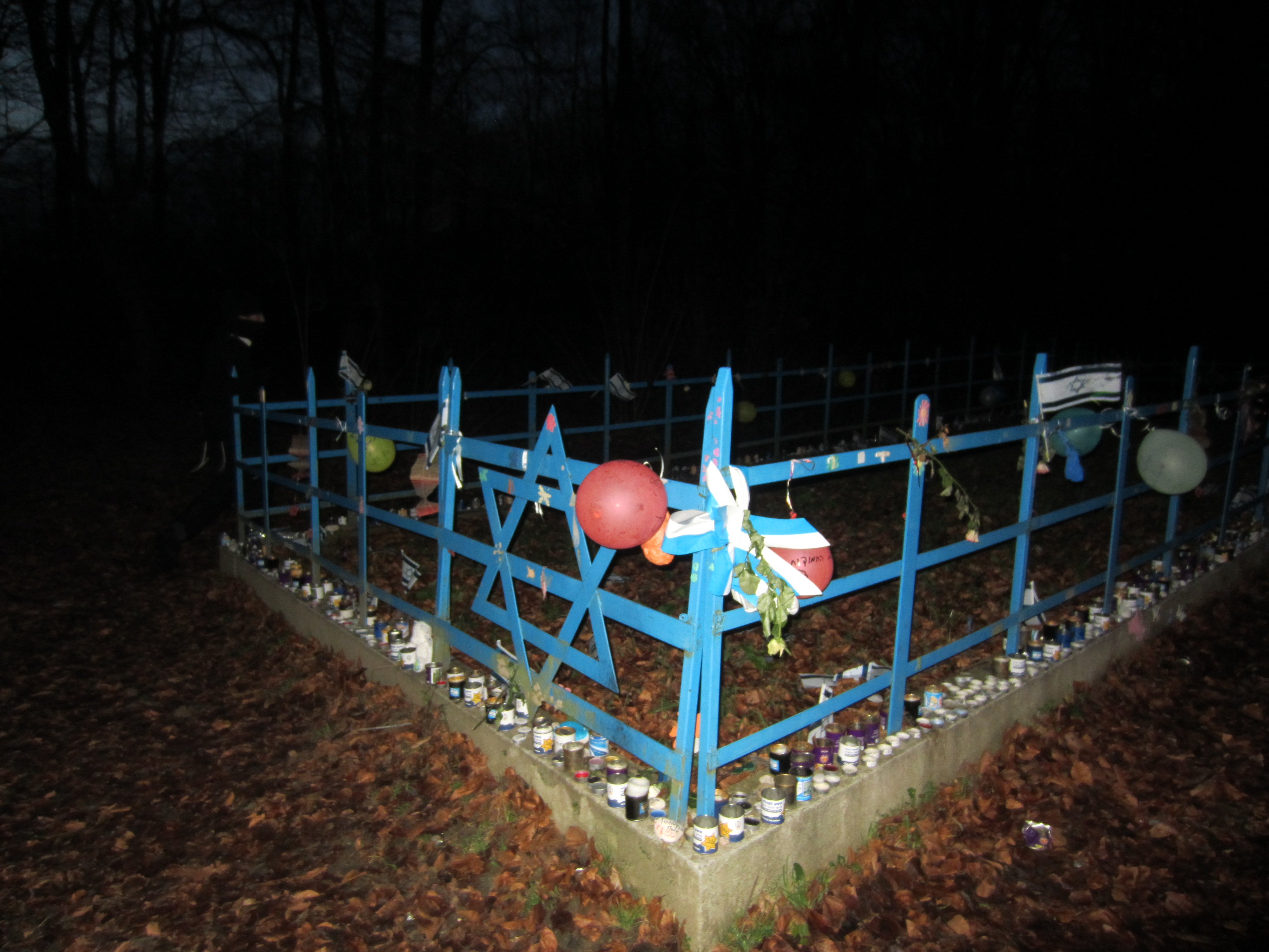 יערות בוצ'ינה, מקום הירצחם של יהודי טרנוב. קבר הילדים היתומים (10).jpg